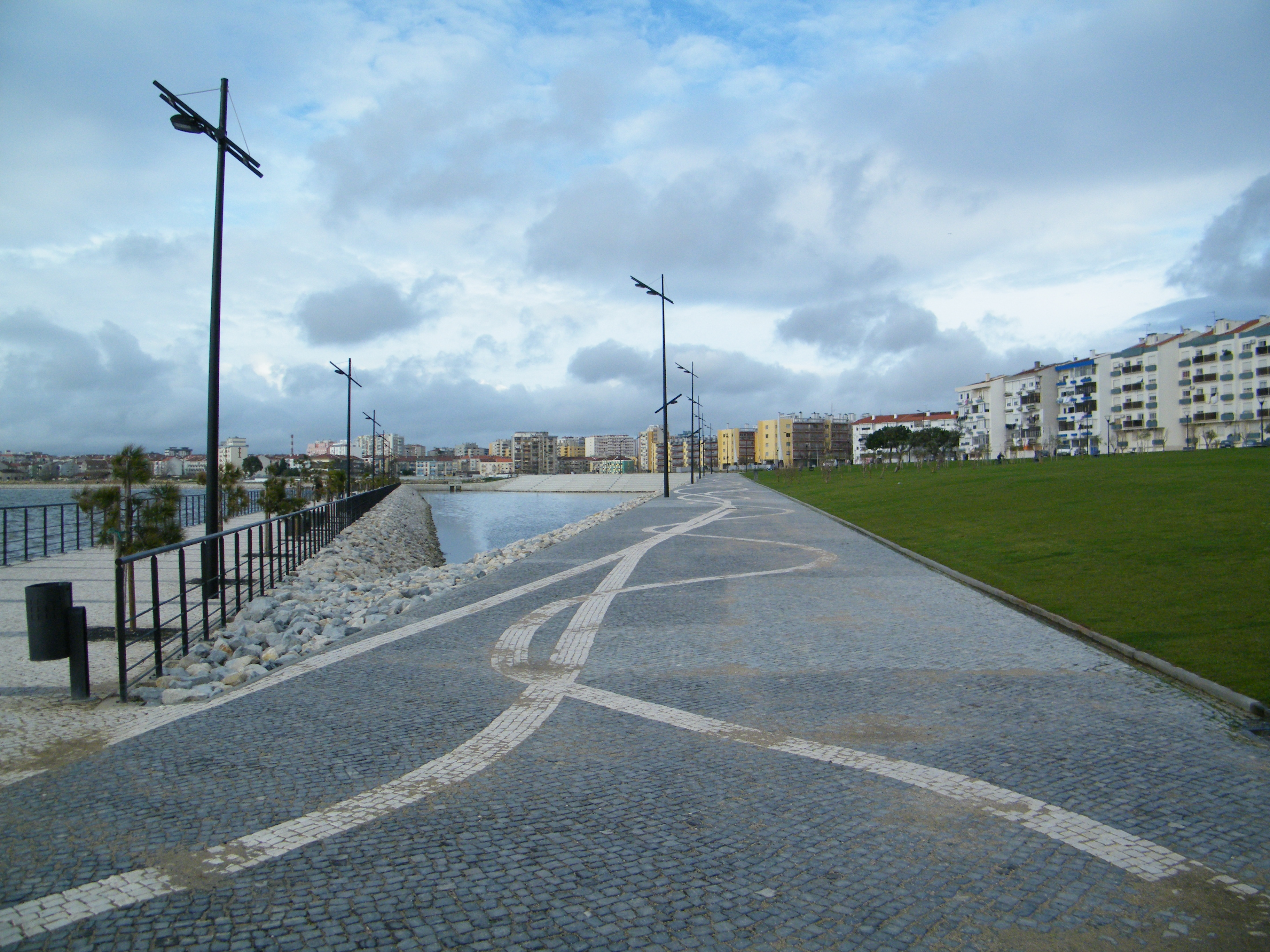 Zona junto á praia de copacabana, projecto Polis, na freguesia de Santo André, Barreiro